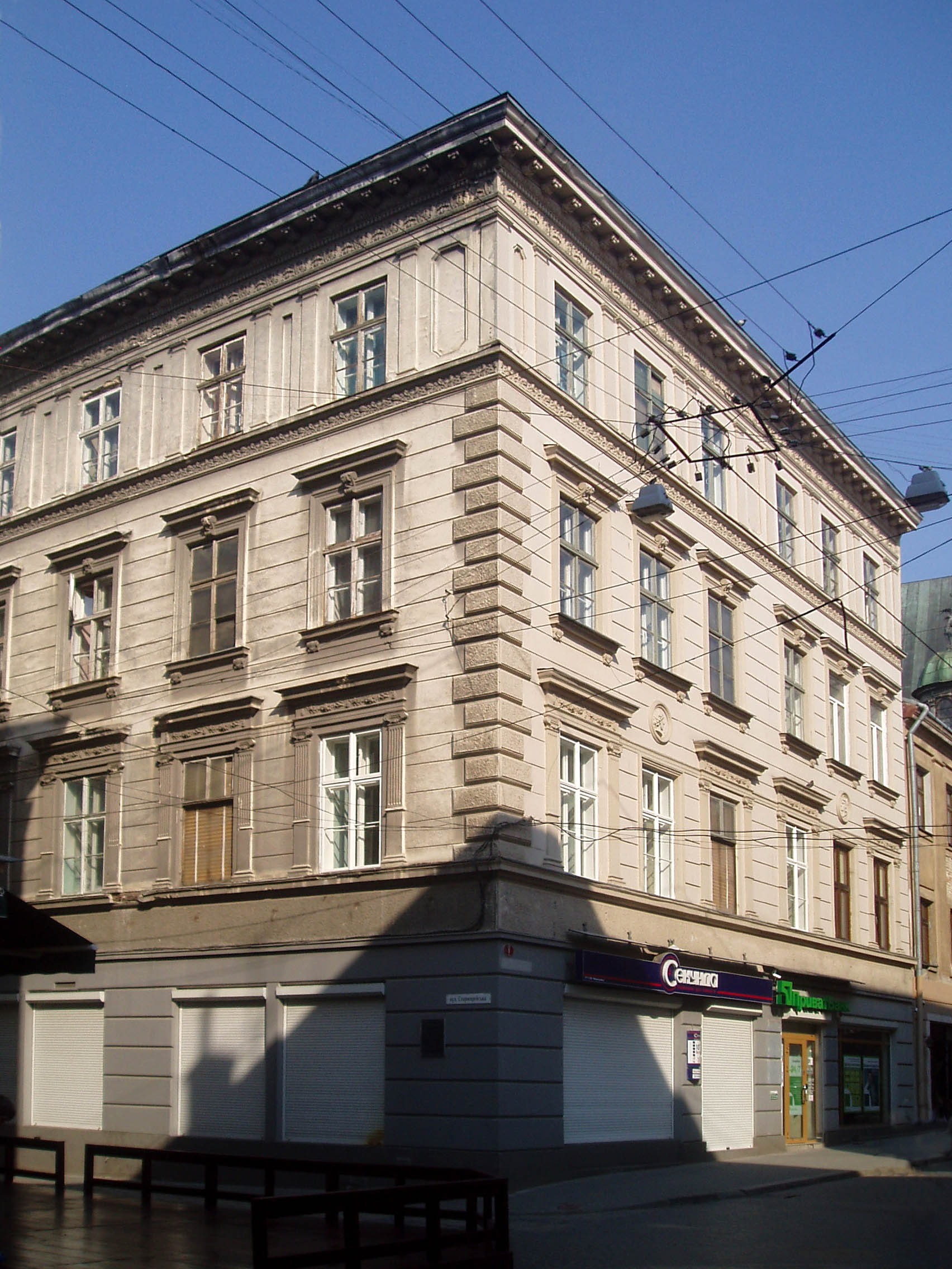 Будинок № 6 на вулиці Галицькій у Львові (1883). Архітектор Зигмунт Кендзерський (1839—1924).